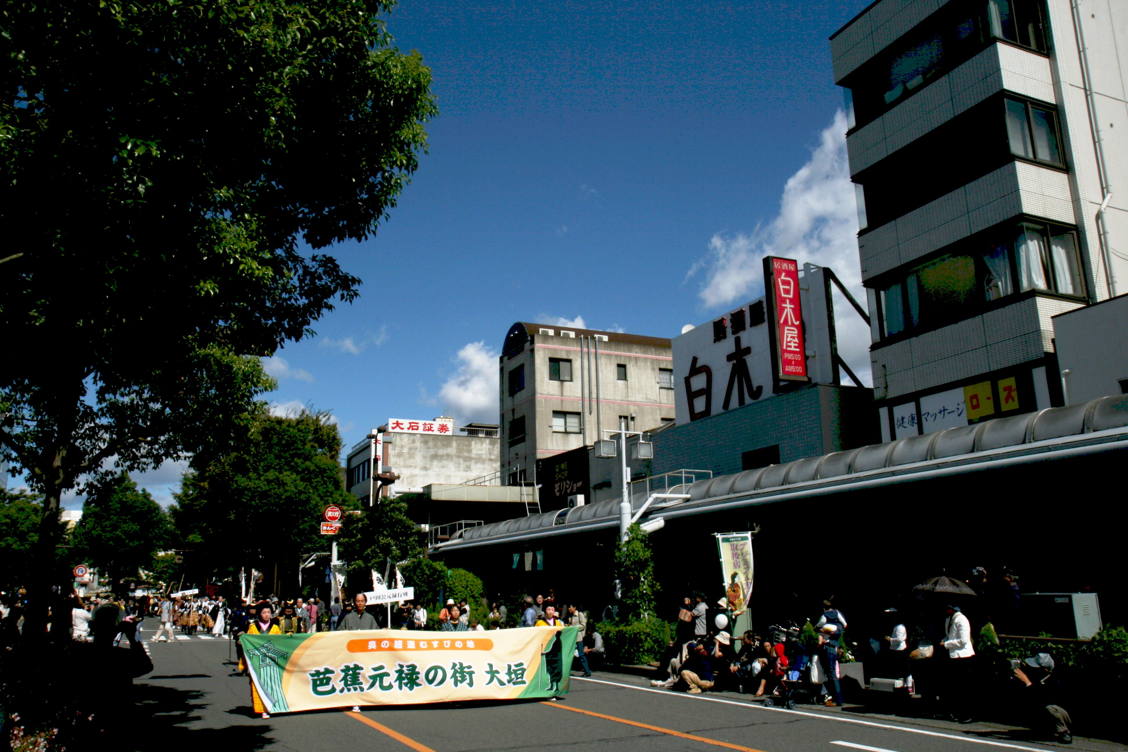 岐阜県大垣市東外側町